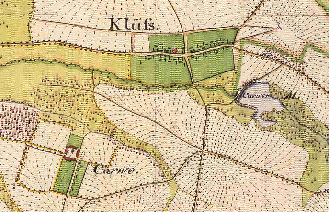 Karwe, Gemeindeteil der Gemeinde Karstädt, Landkreis Prignitz, Brandenburg und Klüß, Gemeinde Brunow, Landkreis Ludwigslust-Parchim, Mecklenburg-Vorpommern, Ausschnitt aus dem Urmesstischblatt 2736 Dallmin von 1825